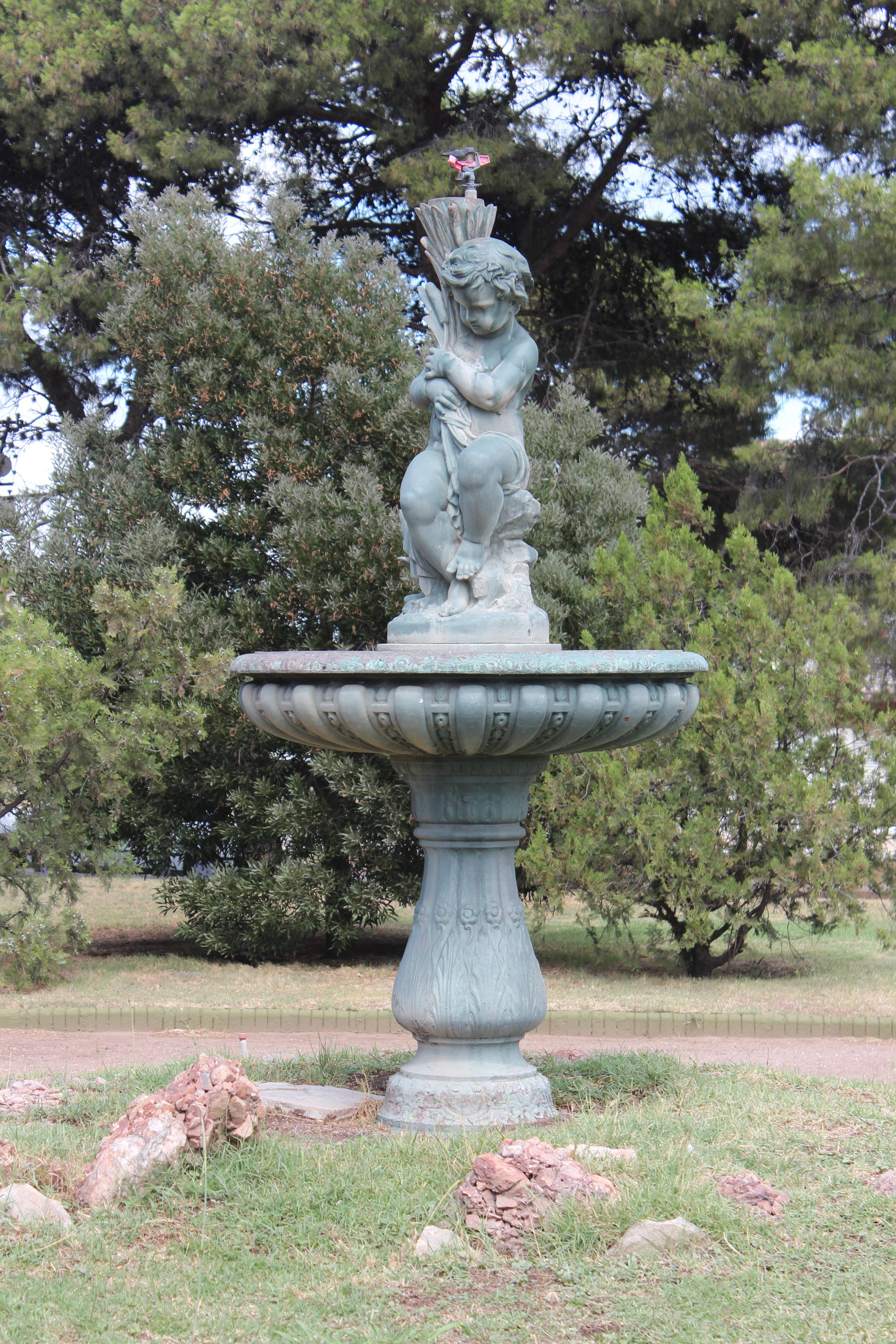 Fuente en el interior de la Plaza E. Tornquist, Bs As, Argentina